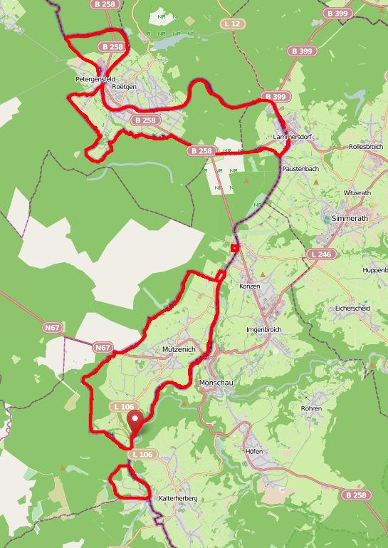 Durch die Auswirkungen des Versailler Vertrages und den Übergang des Gebietes der Vennbahntrasse an Belgien wurden im Grenzgebiet deutsche Exklaven geschaffen